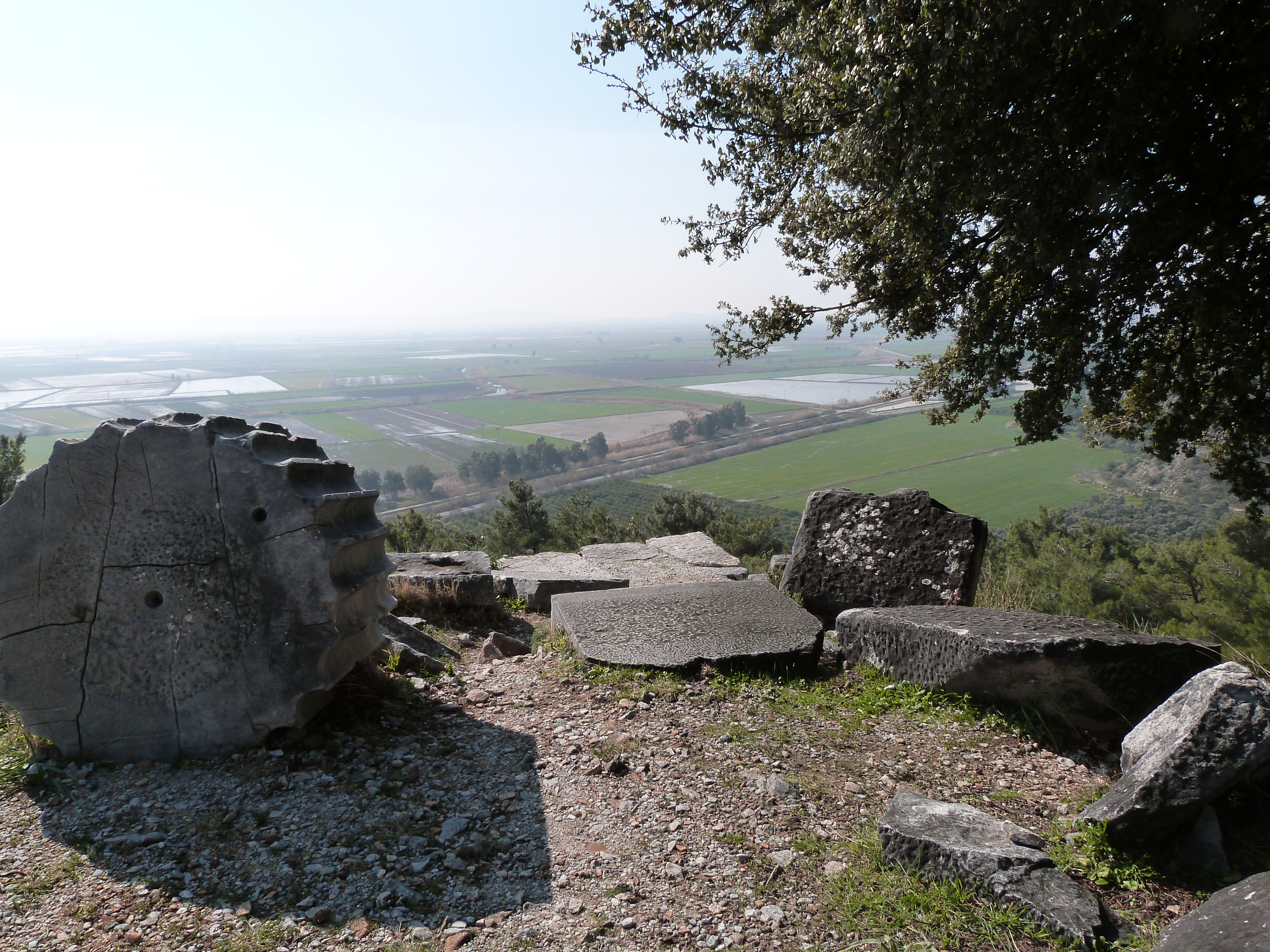 A l'époque des guerres avec la Perse, le port de Priène avait des eaux profondes mais, peu à peu, les alluvions du Méandre repoussèrent la mer et l'enlisèrent.